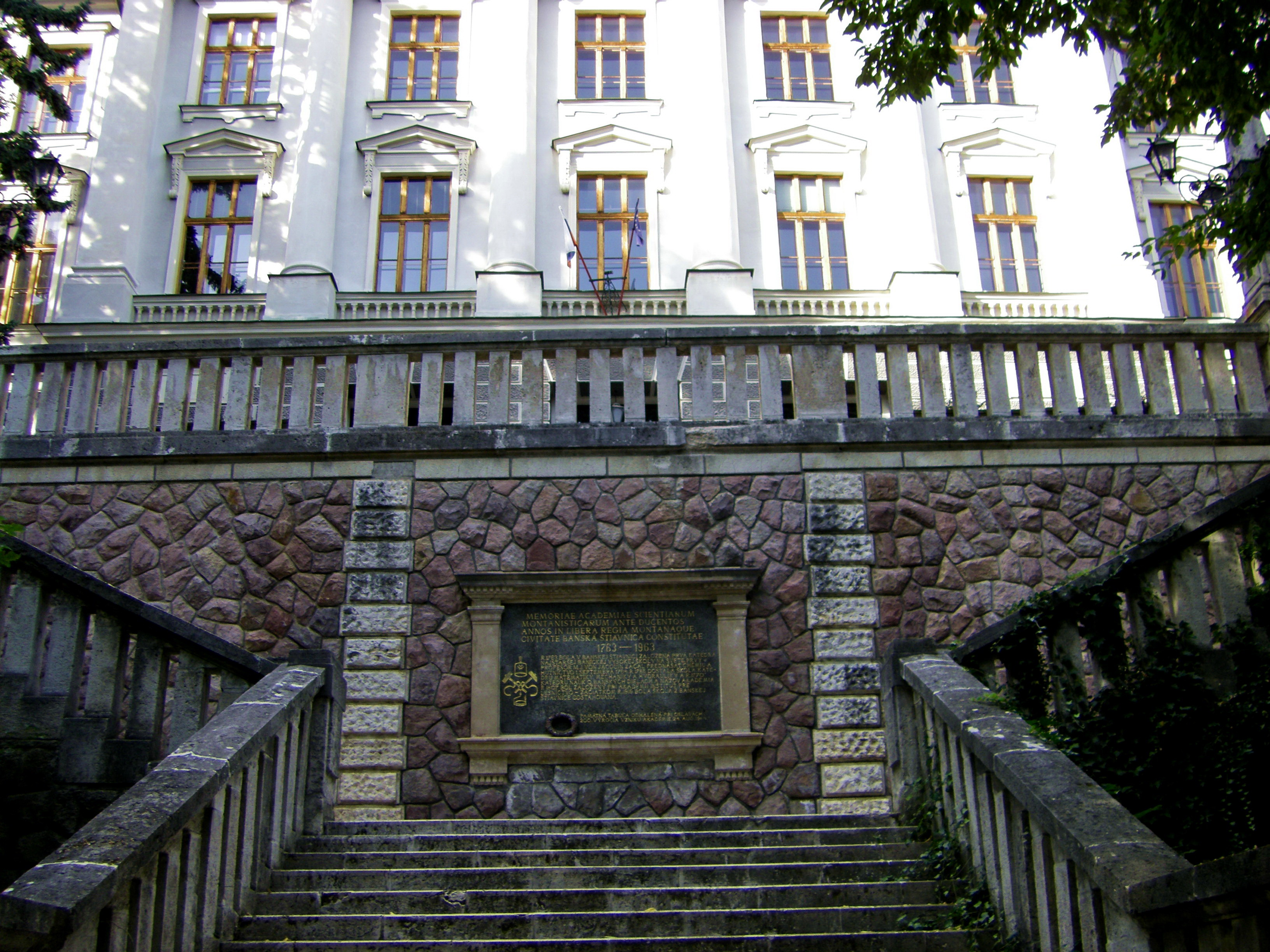 Akadémia